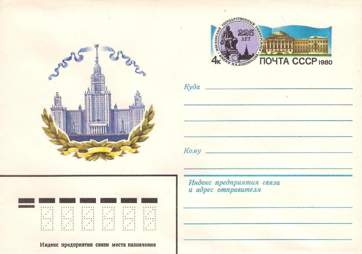 225 лет МГУ